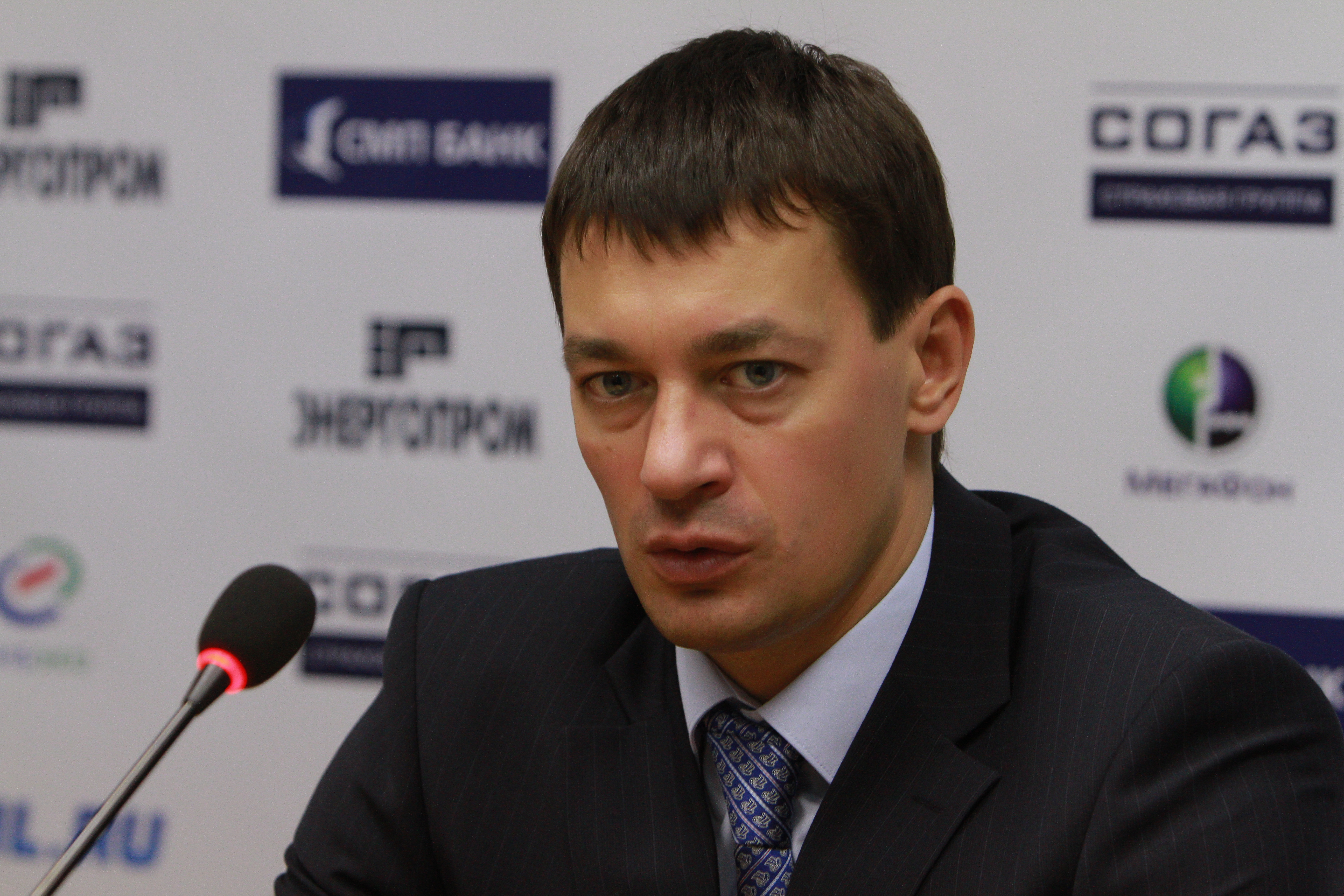 Фотография Андрея Владимировича Тарасенко